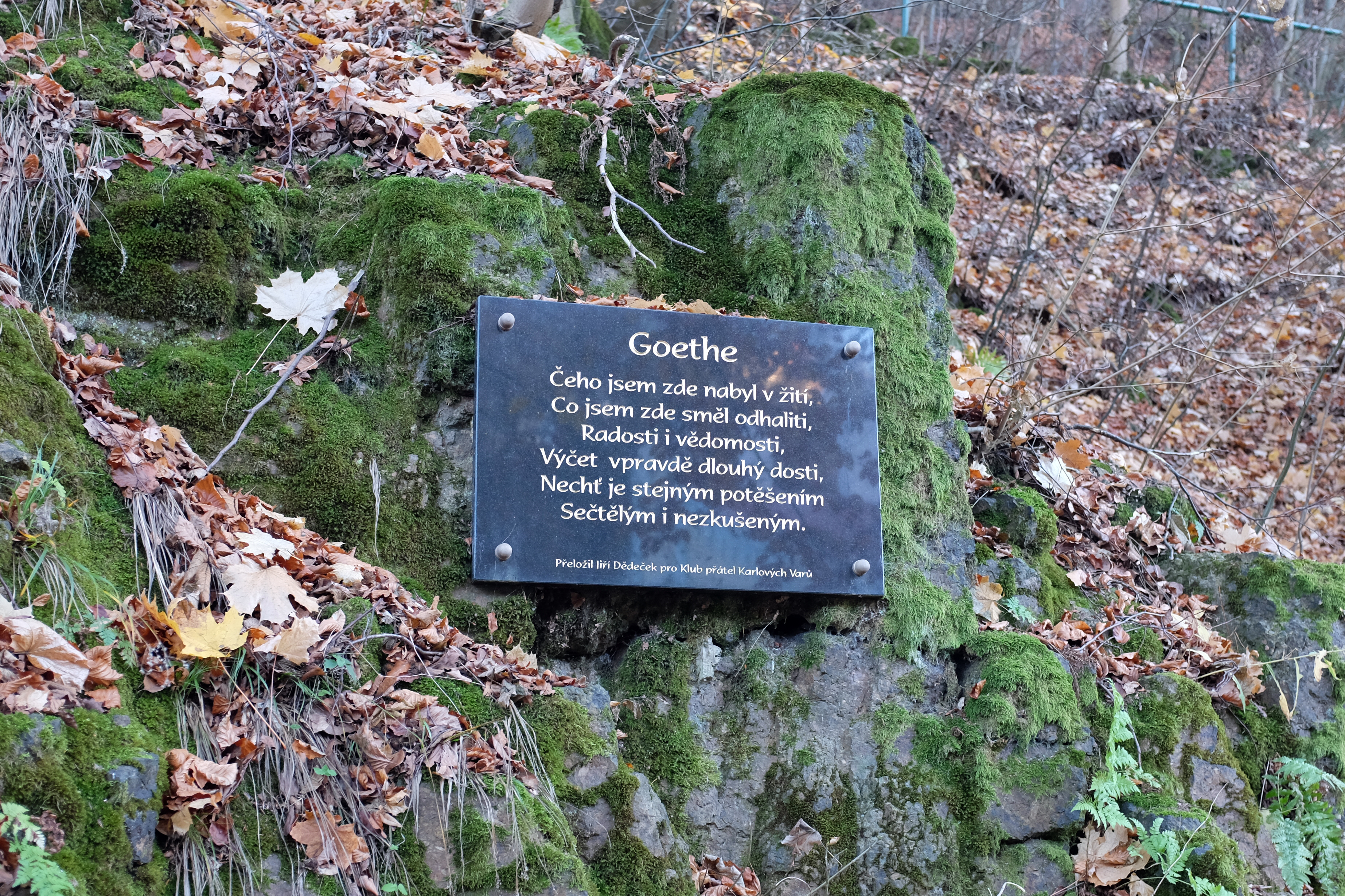 Busta J. W. Goetha, Goethova stezka, parc. 781/1, Karlovy Vary.